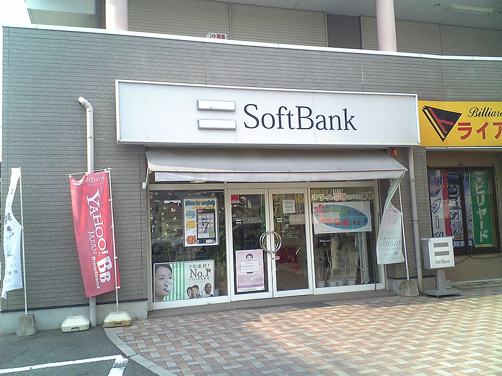 ソフトバンク今宿（福岡県福岡市西区）